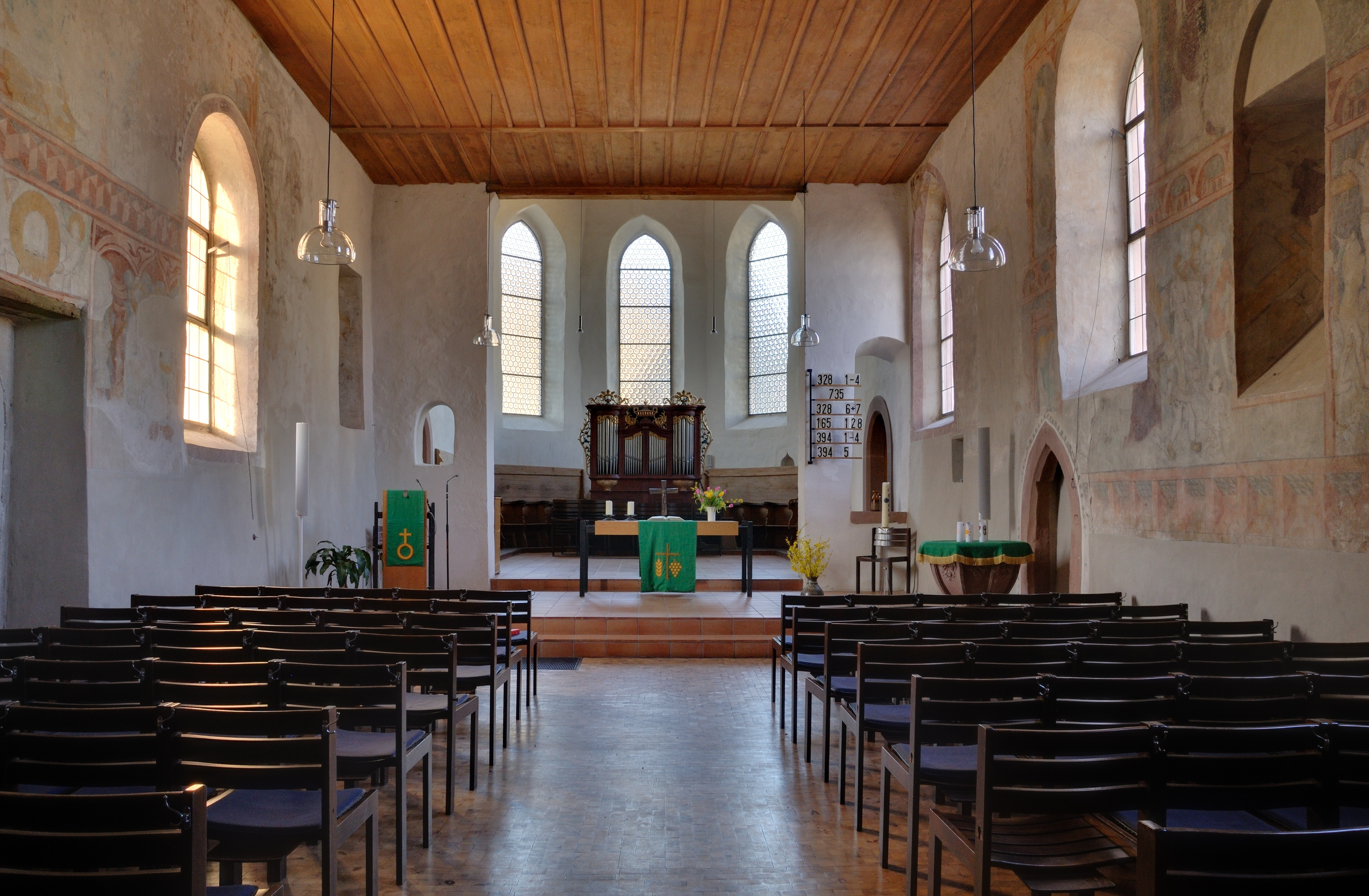 Fischingen: Evangelische Kirche